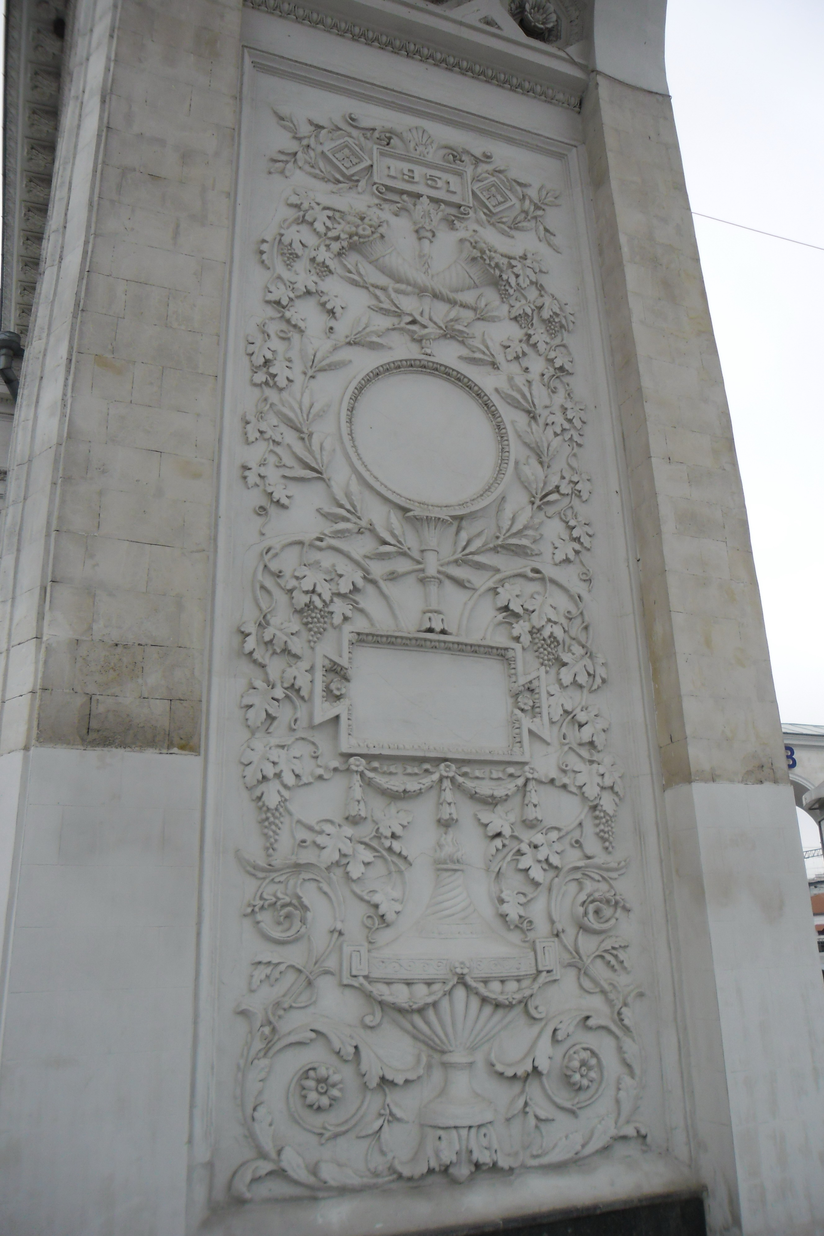 Фото